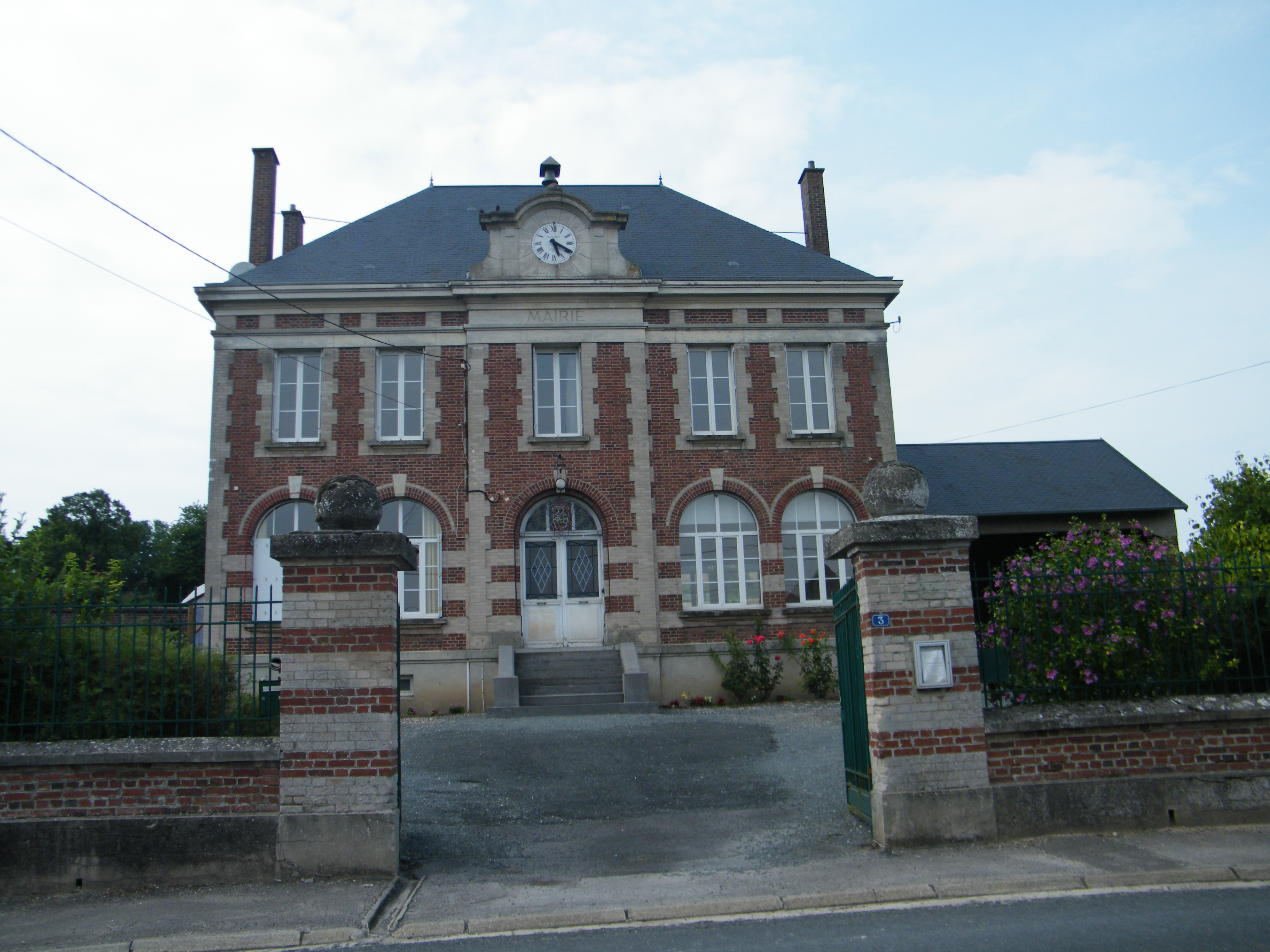 Mairie.